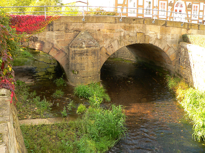 Gilsabrücke in Jesberg